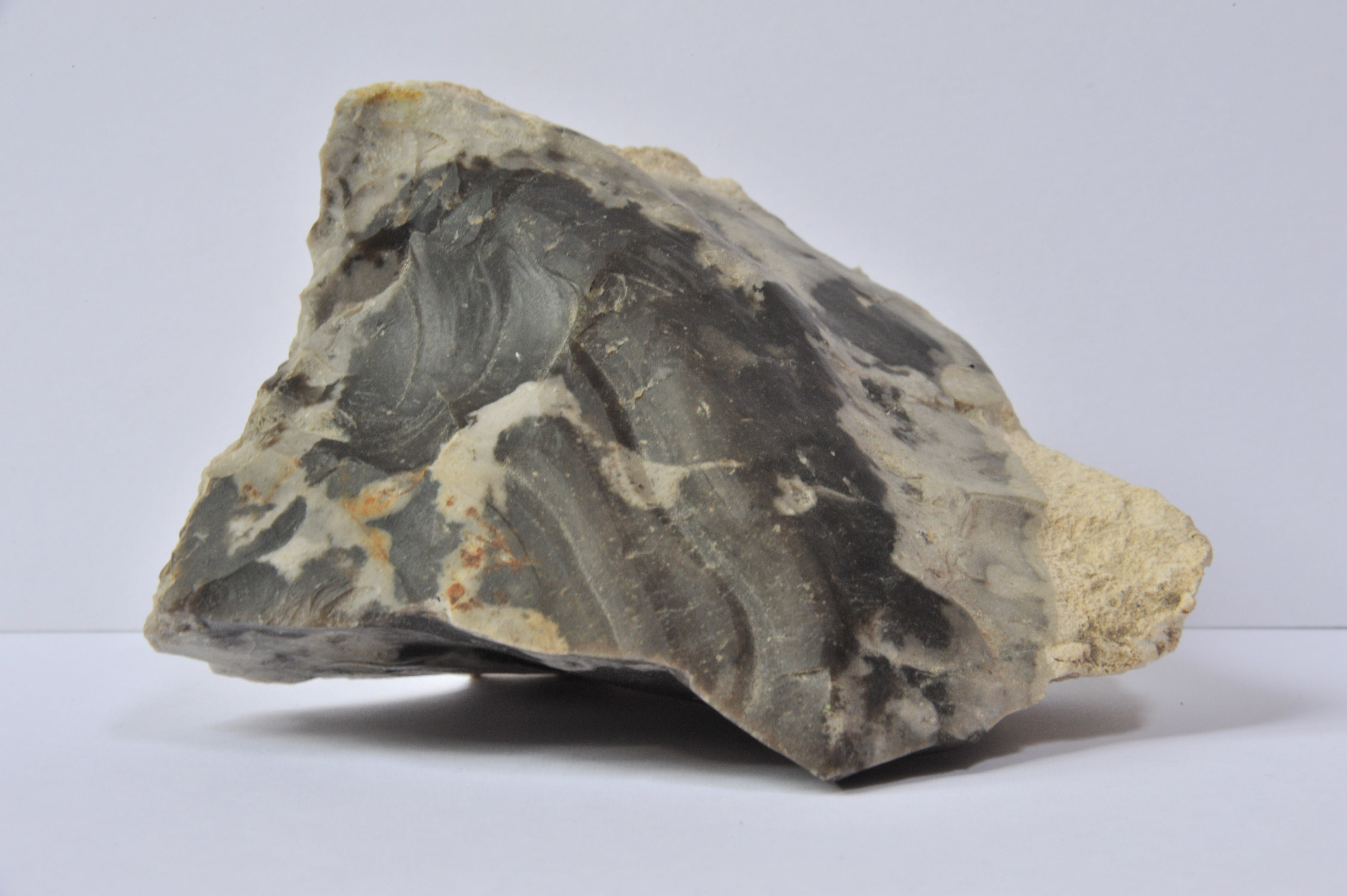 Morceau de marne prise sur le faît des Marnes à Assigny